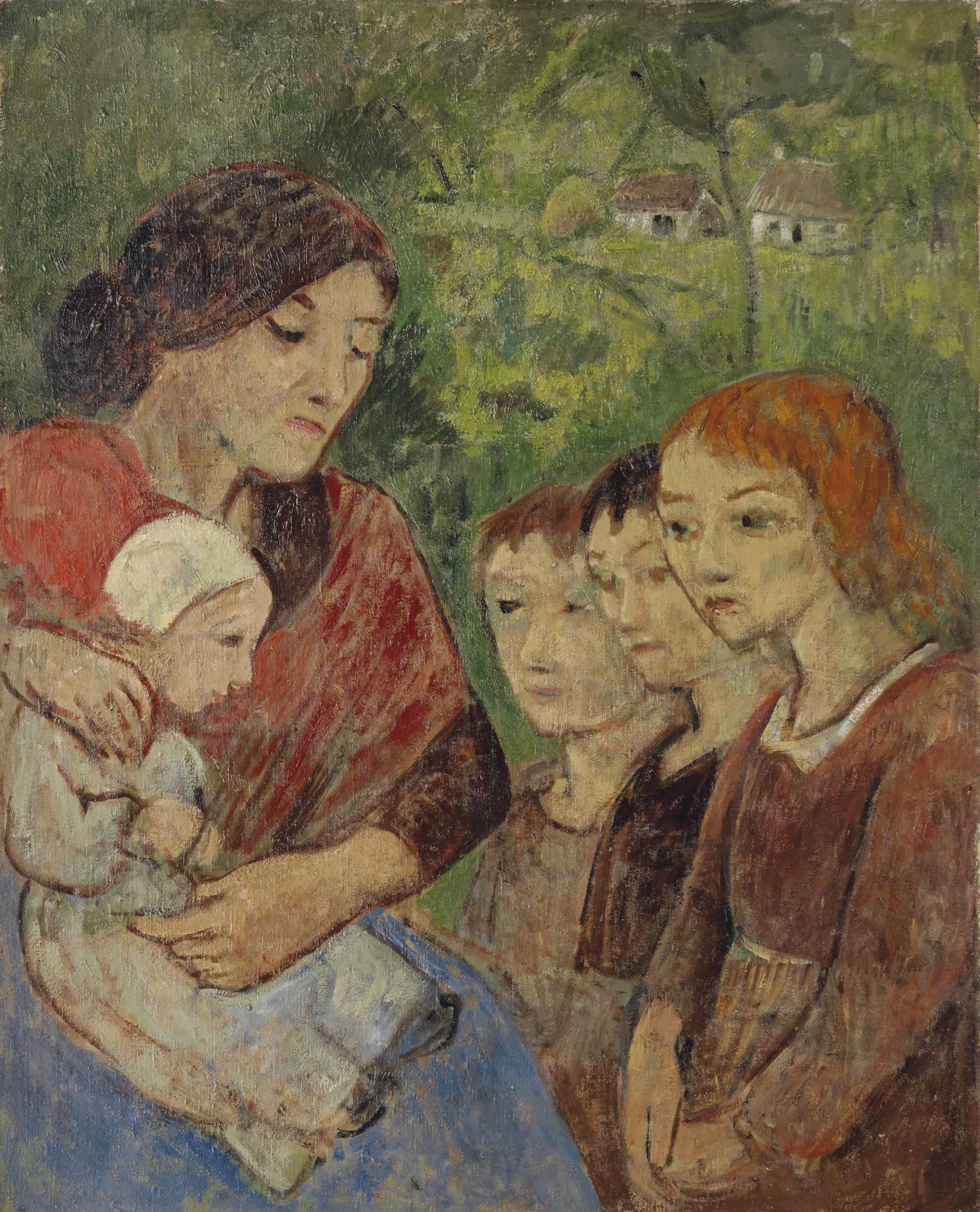 Paul Sérusier : Mère et enfants (huile sur toile, vers 1925).